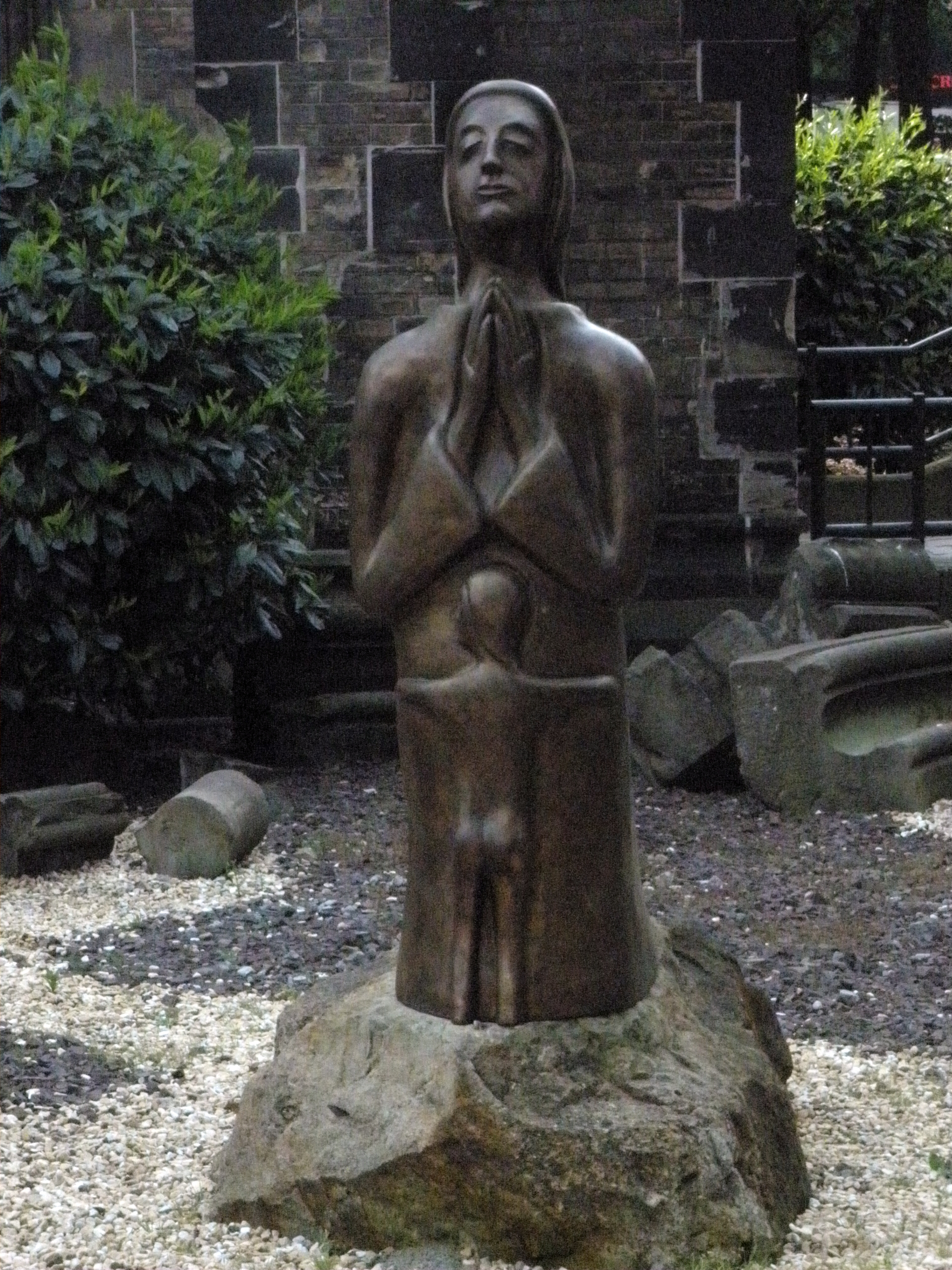 bronze friedensgebet im mahnmal st. nikolai hamburg, von der bildhauerin edith breckwoldt